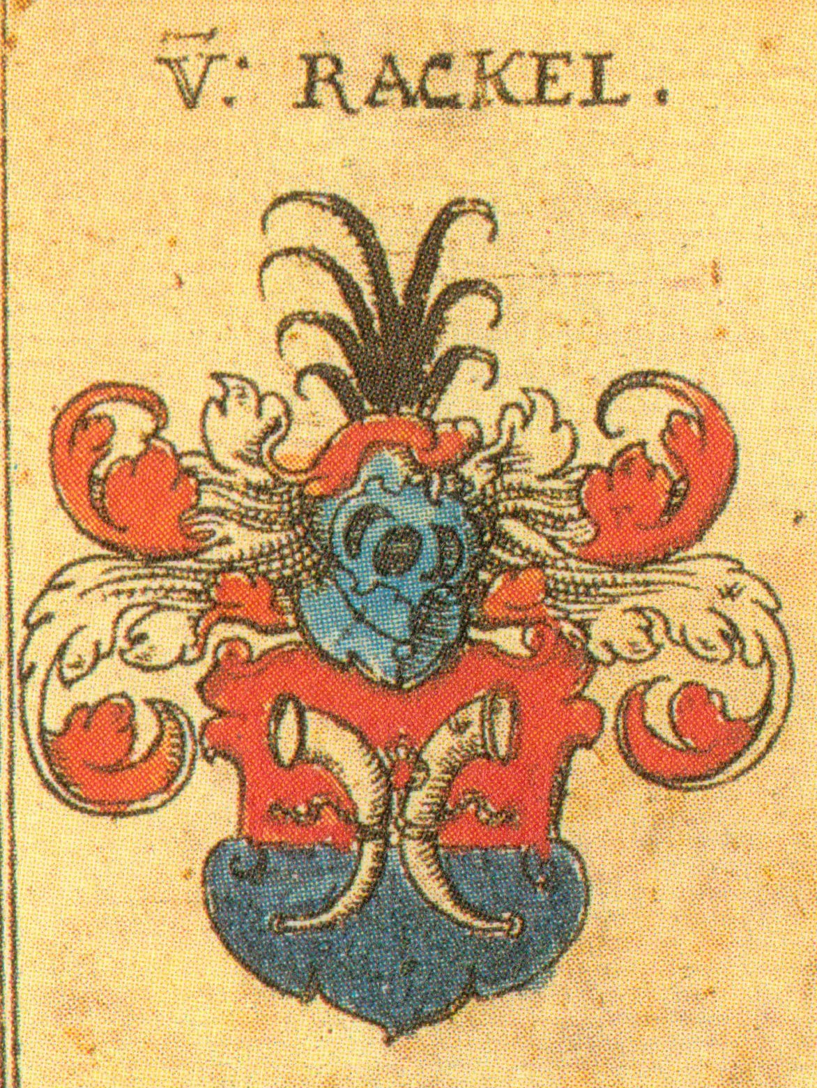 Wappen derer von Rackel